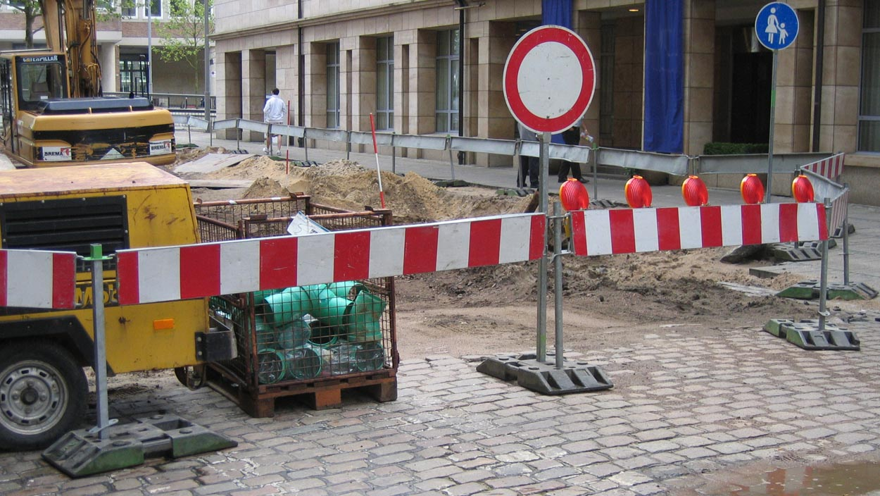 Ein metallende Absperrschranke vor einer Baustelle